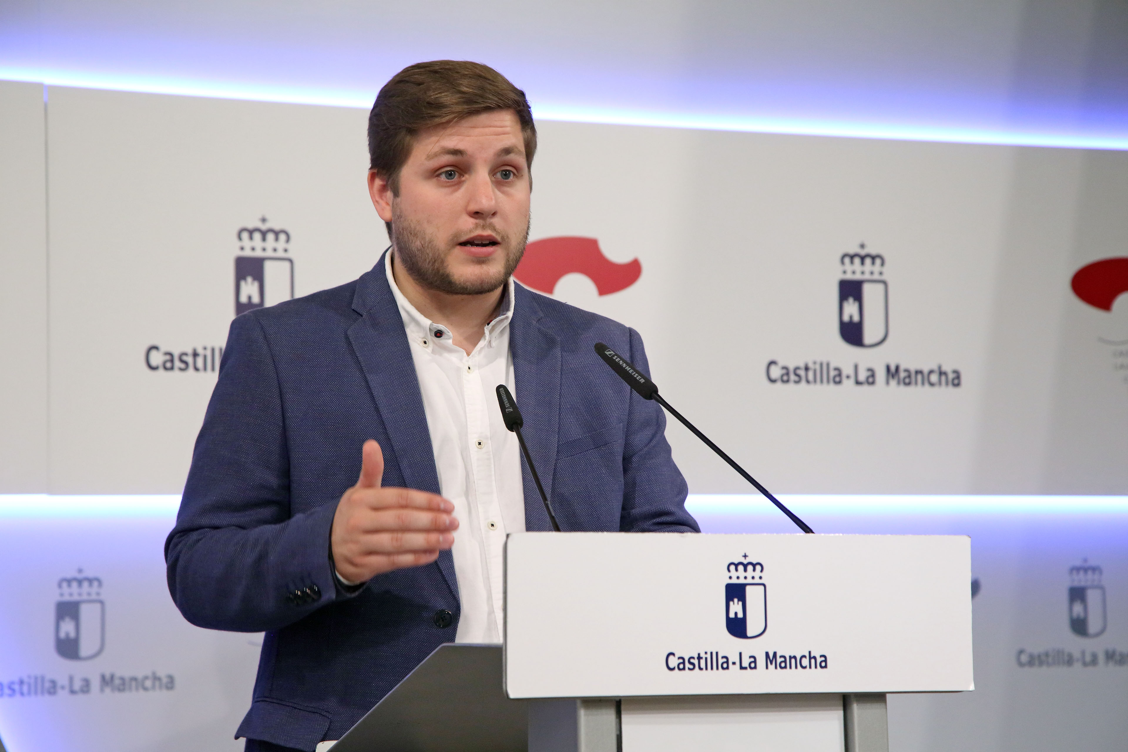 Toledo, 26 de junio de 2019.- El portavoz en funciones del Gobierno regional, Nacho Hernando, informa de los acuerdos aprobados en el Consejo de Gobierno, en el Palacio de Fuensalida. (Foto:Álvaro Ruiz // JCCM)